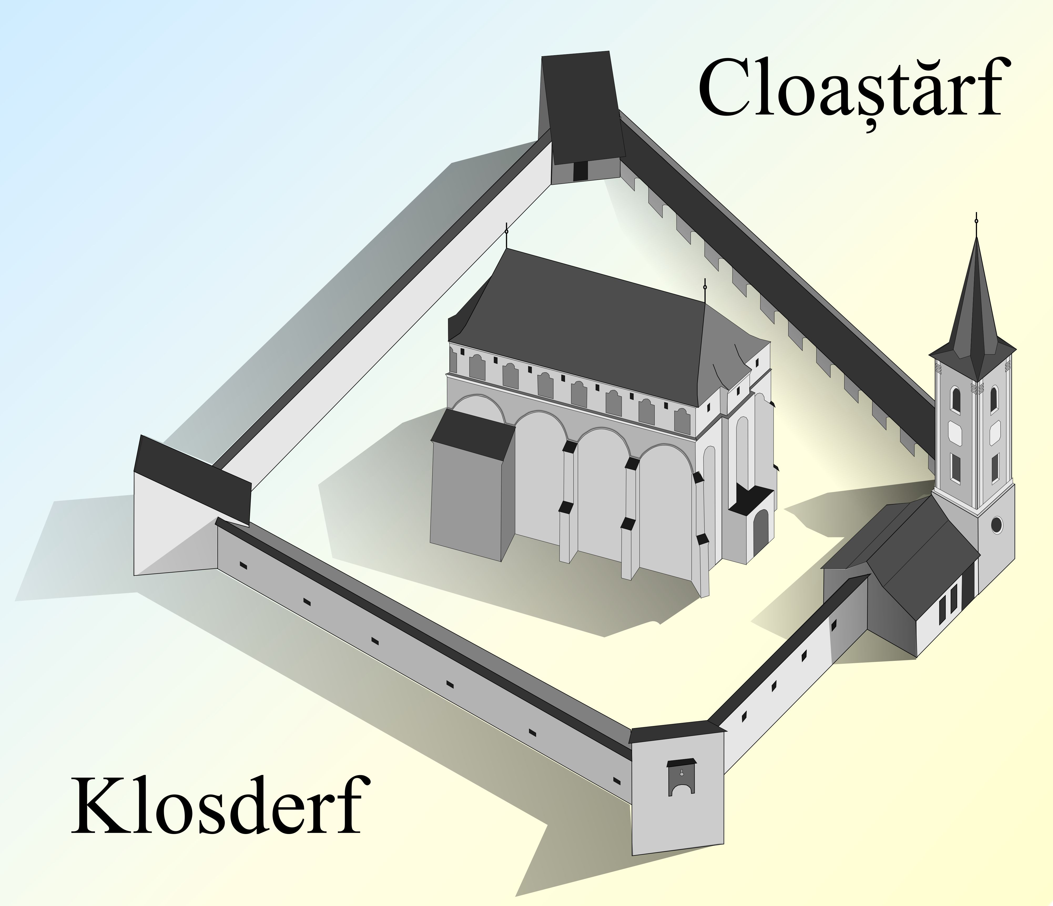 Biserica fortificata din Cloașterf} (machetă)